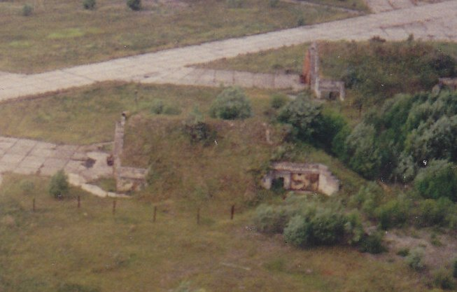 Арочное укрытие на аэродроме Тапа